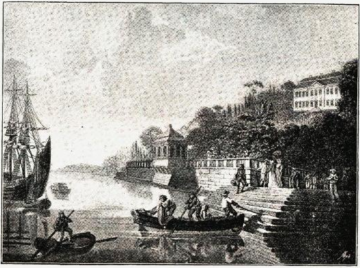 «Ljan. Efter et gammelt Kobberstik, tilhørende fru Thea Ingier, Ljan.» Kobberstikk etter maleri av Christian August Lorentzen